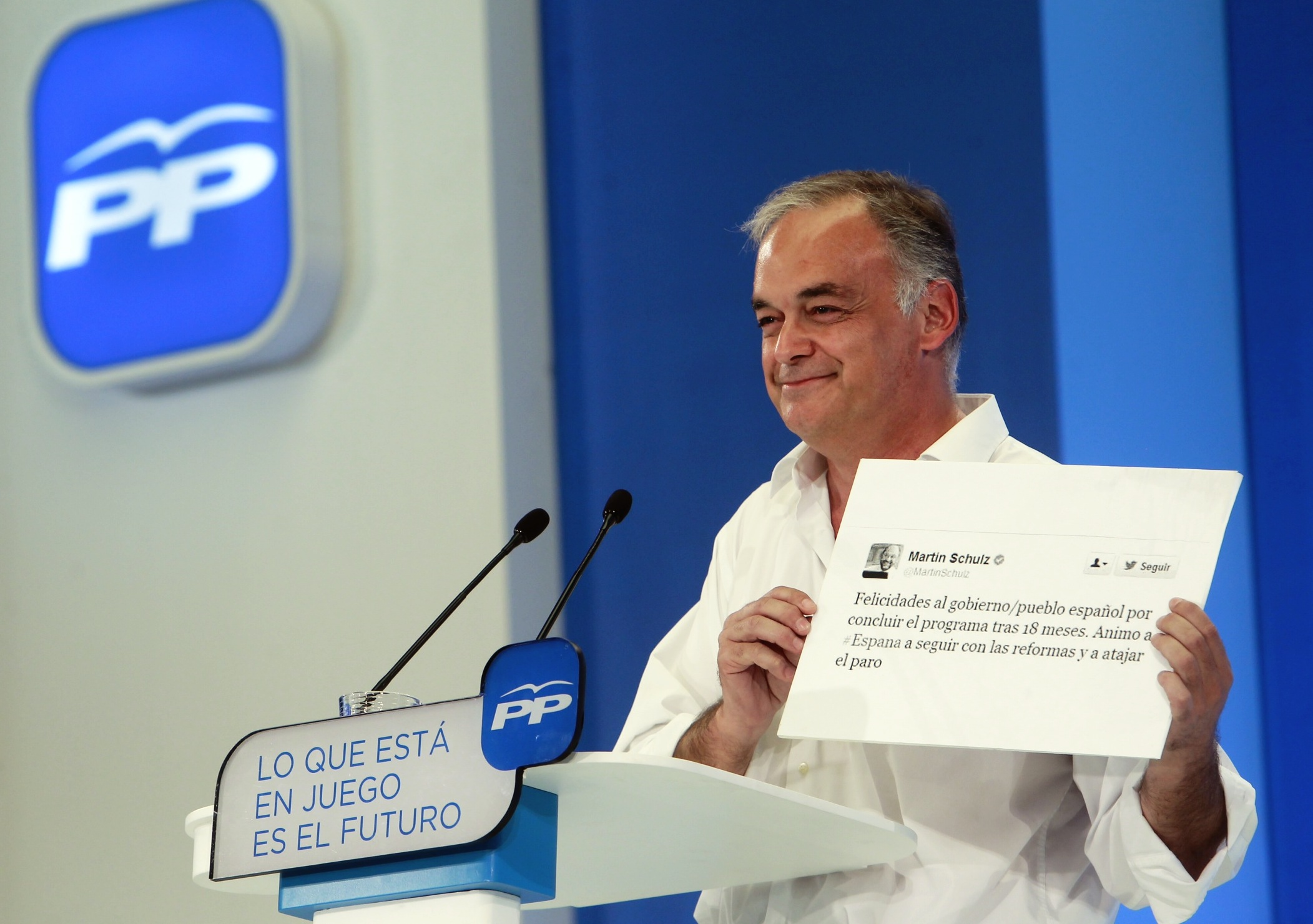 Fabra, Císcar, González Pons y Eva Ortiz participa en el acto central de campaña del PP de Alicante